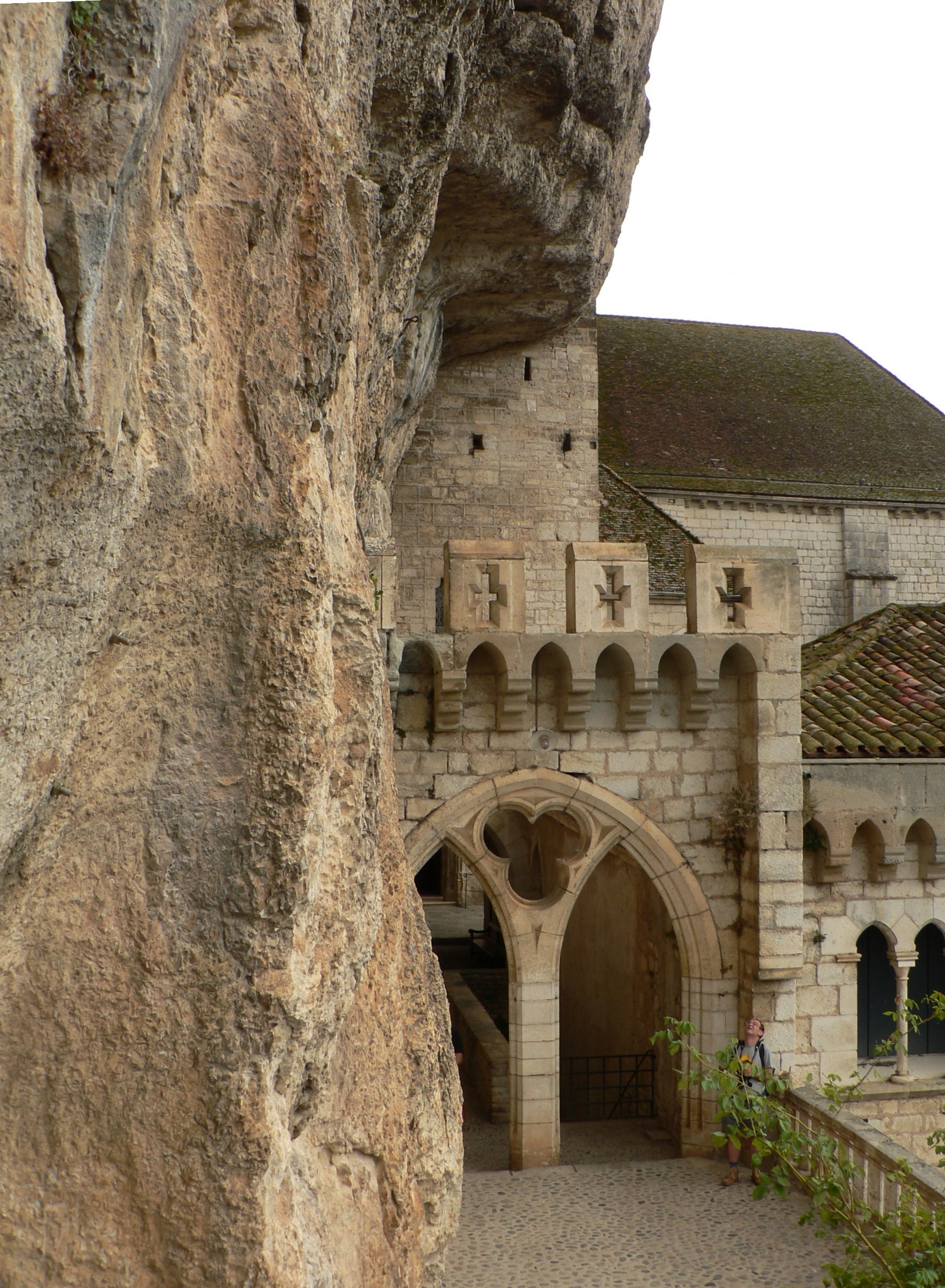 Rocamadour (France), le sanctuaire, détail